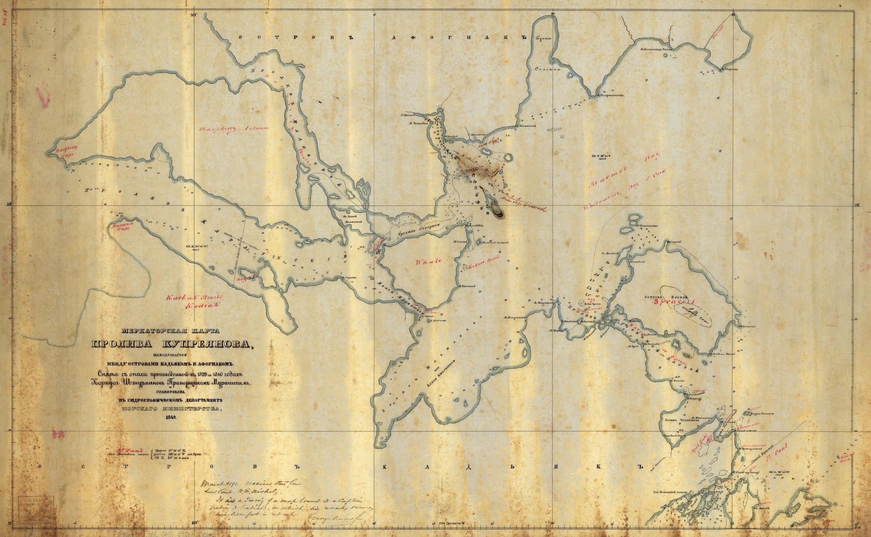 «Меркаторская карта пролива Купреянова, находящегося между островами Кадьяком и Афогнаком», вышедшая в 1848 г. и составленная по описям И. Ф. Васильева 1809 г. и И. Я. Васильева 1833 г.